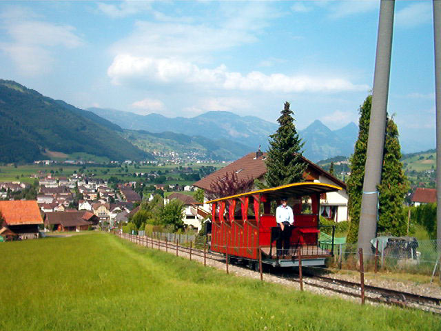 Stanserhornbahn